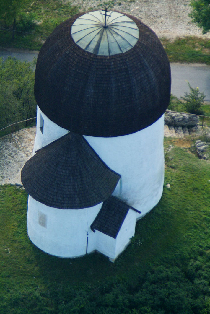 Rotunda - Öskü - Hungary - Europe